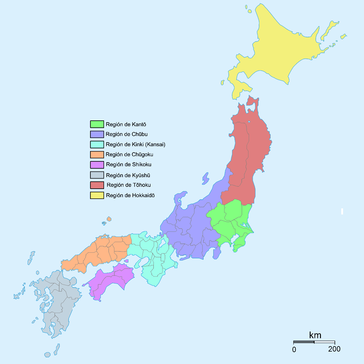 Mapa geográfico y por regiones de Japón, basado en la serie de novelas ligeras, Kyōkai Senjō no Horizon. (Mapa ficticio de Japón)